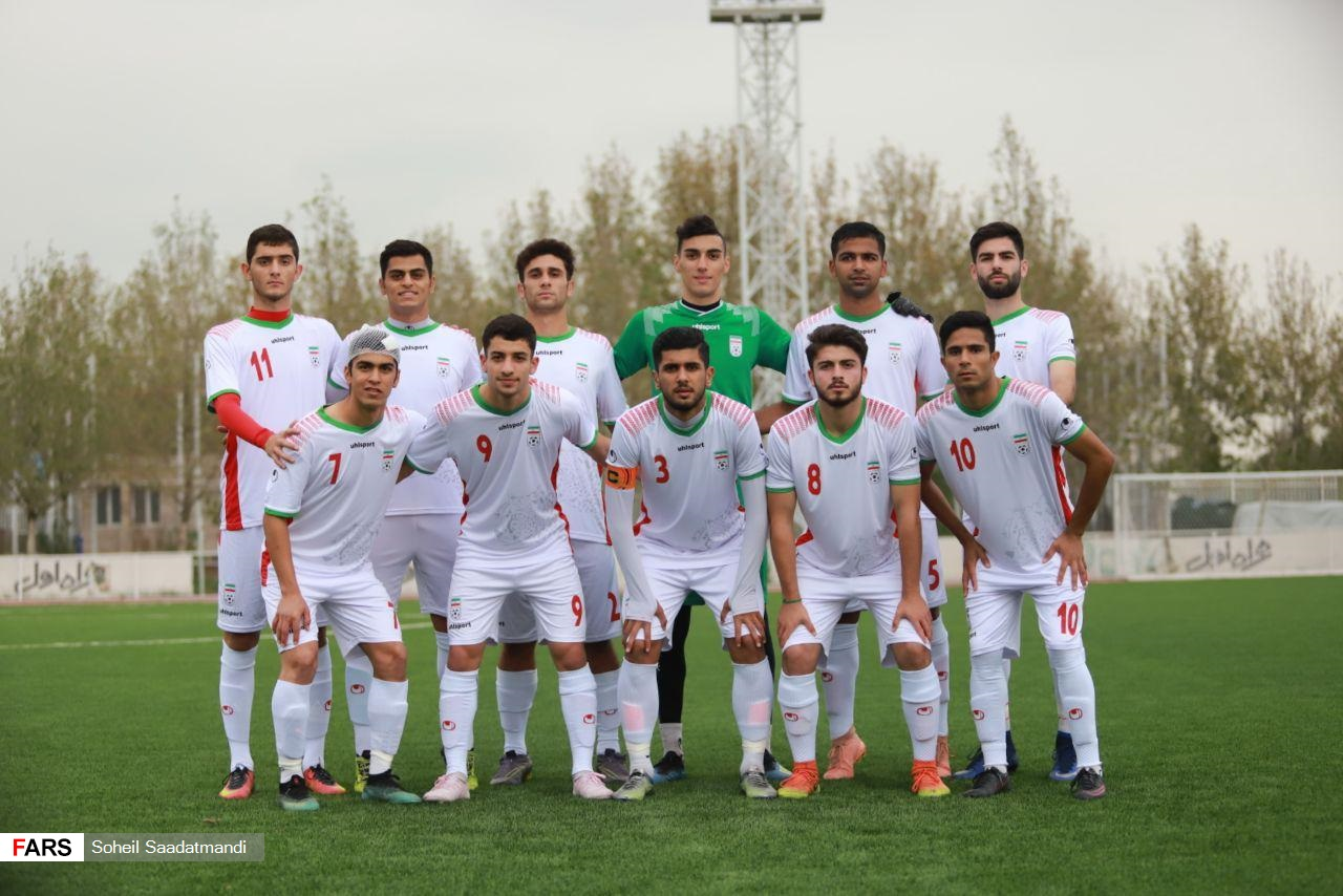 دیدار دوستانه تیم ملی فوتبال جوانان ایران و تیم فوتبال بزرگسالان استقلال از ساعت ۱۴:۳۰ شنبه ۴ آبان ۱۳۹۸ در زمین شماره ۳ کمپ تیم‌های ملی برگزار شد که در نهایت تیم ملی فوتبال جوانان ایران با تک گل فردین ربطی که در نیمه دوم به ثمر رسید شاگردان استراماچونی را شکست داد.